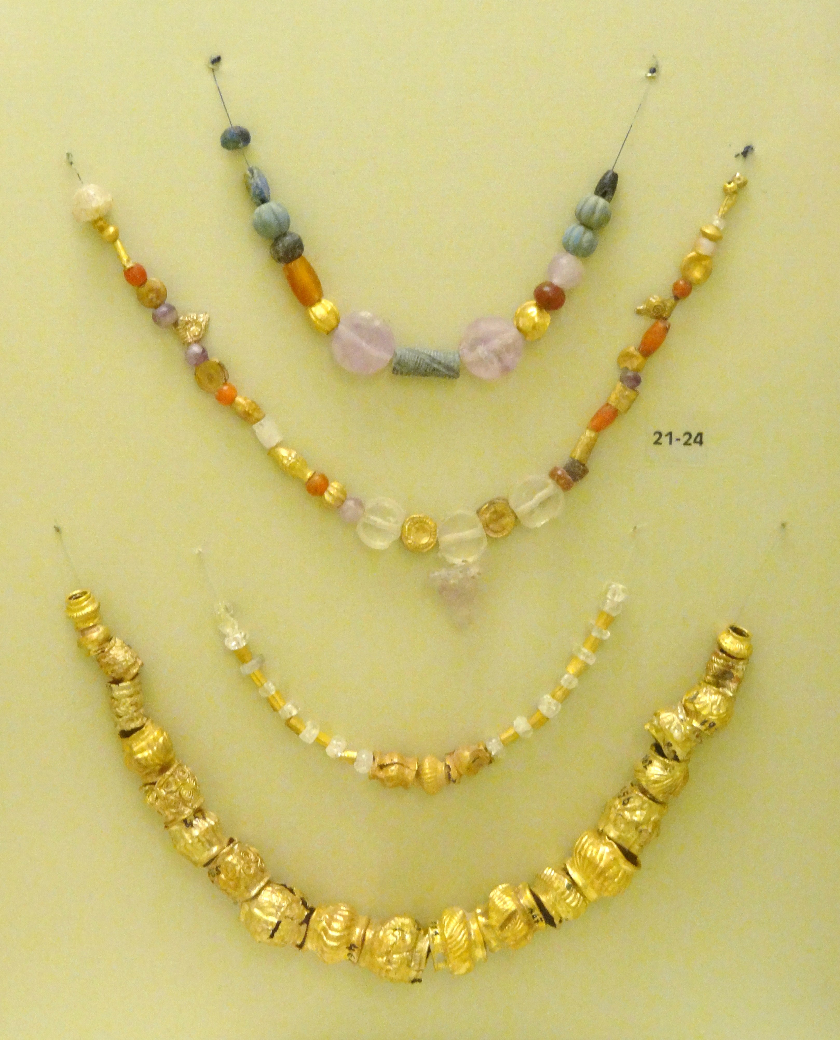 Minoische Halsketten mit Perlen aus Gold und Halbedelsteinen (Vor- bis Neupalastzeit, 2500–1500 v. Chr.) aus Mochlos und Platanos, ausgestellt im Archäologischen Museum Iraklio, Kreta, Griechenland